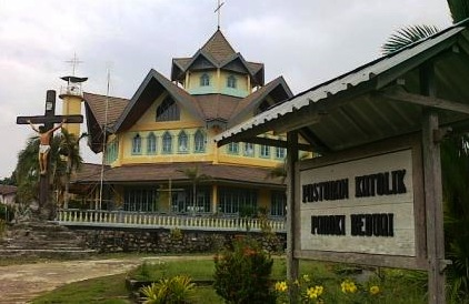 Gereja bagian luar